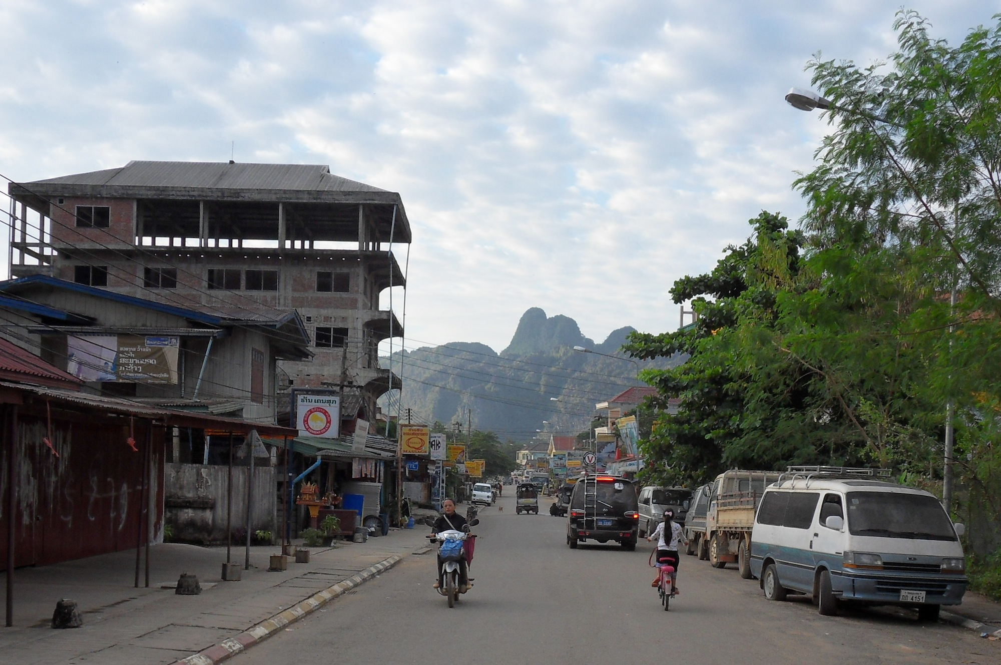 Une rue de Vang Vieng, novembre 2011. La Nam Song se trouve à droite.